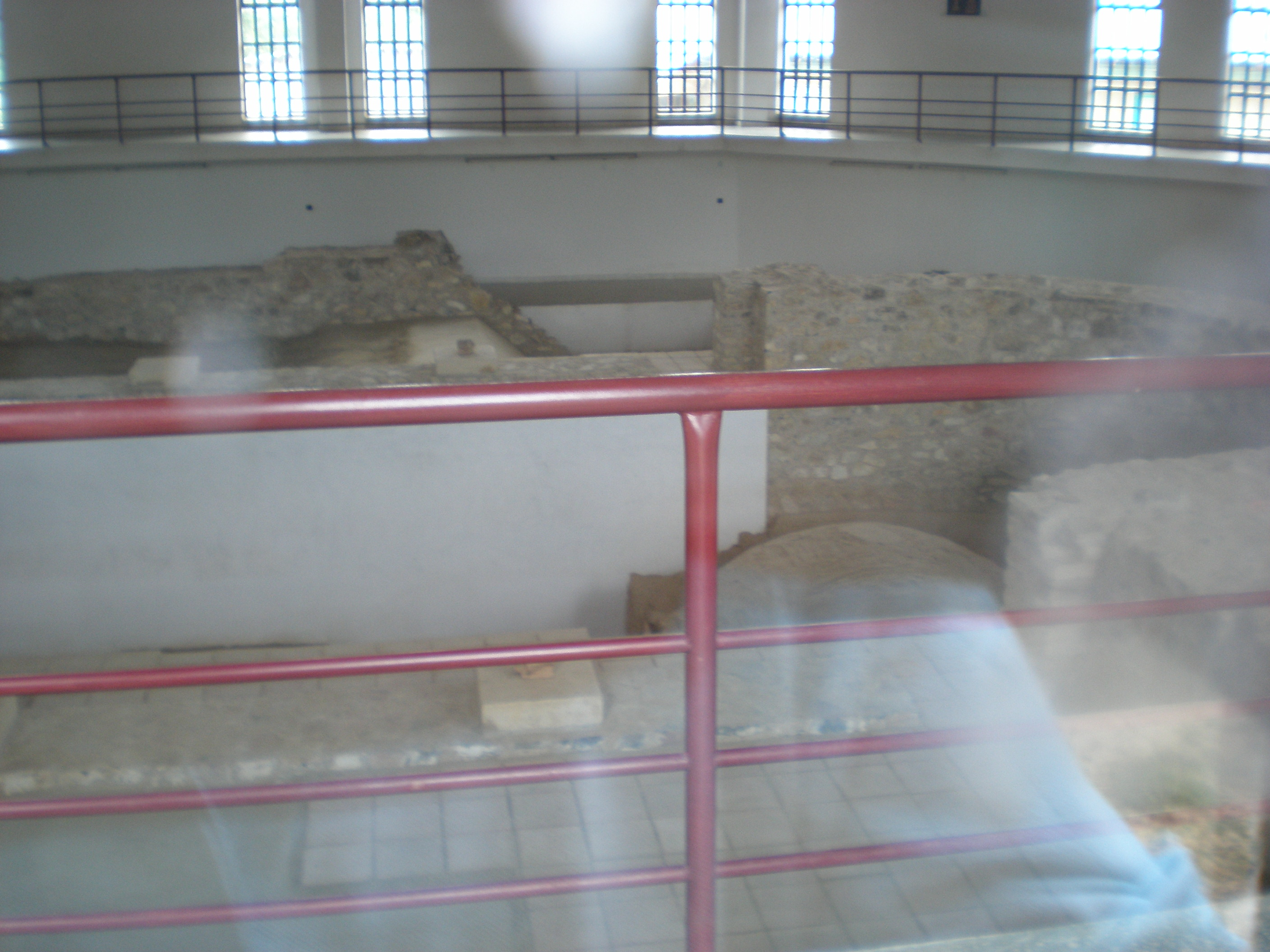 Bazilica paleocreștină cu criptă